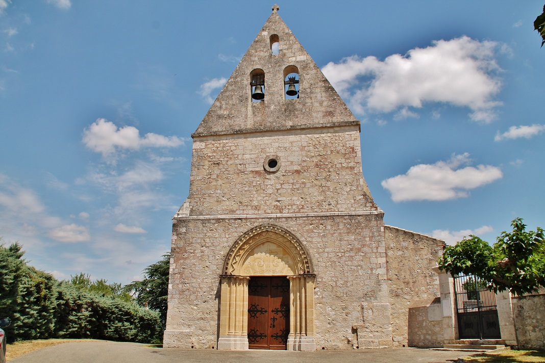 église St Severin